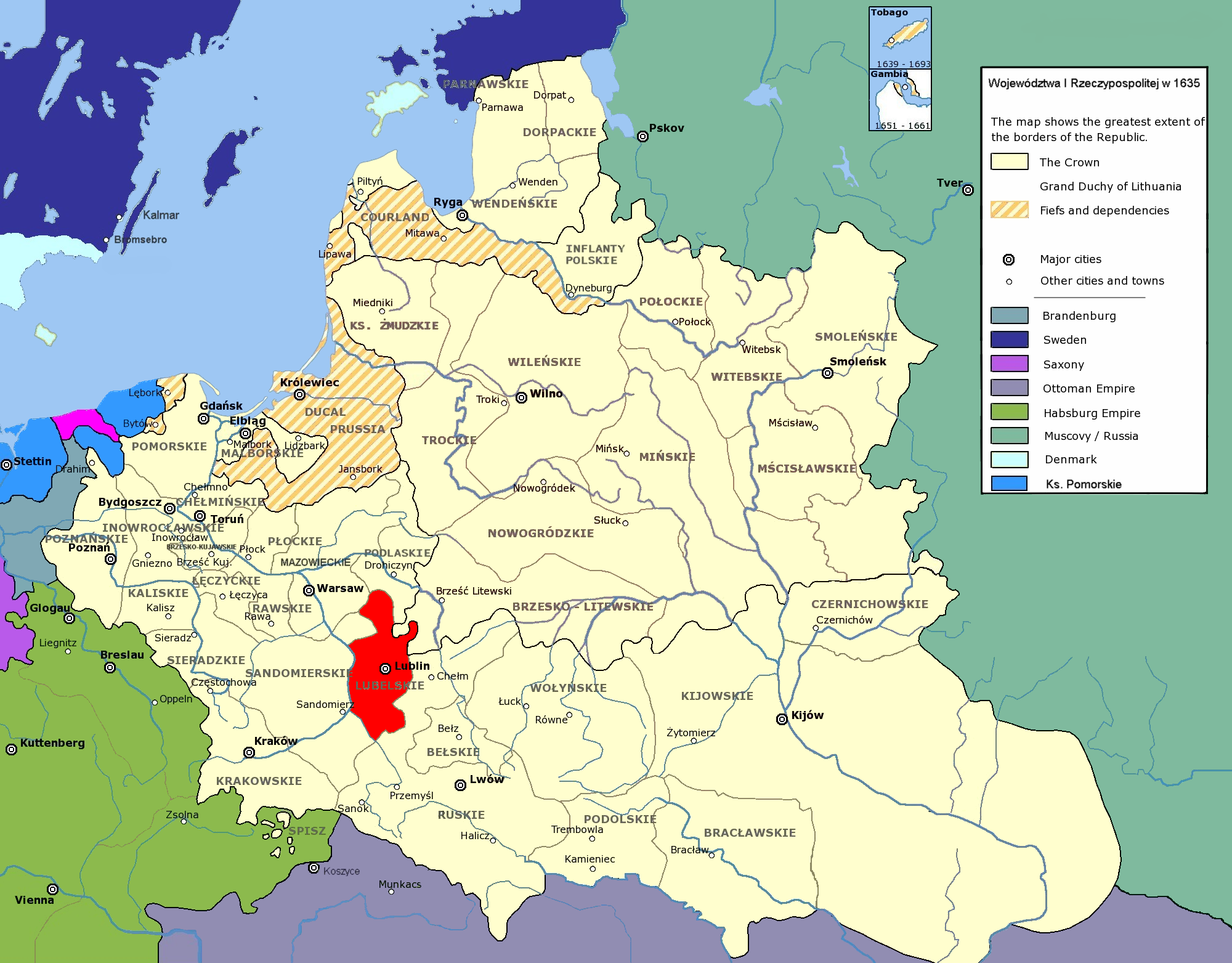 Rzeczpospolita Obojga Narodów w 1635 r.; województwo lubelskie Polish-Lithuanian Commonwealth in 1635; Lublin Voivodeship